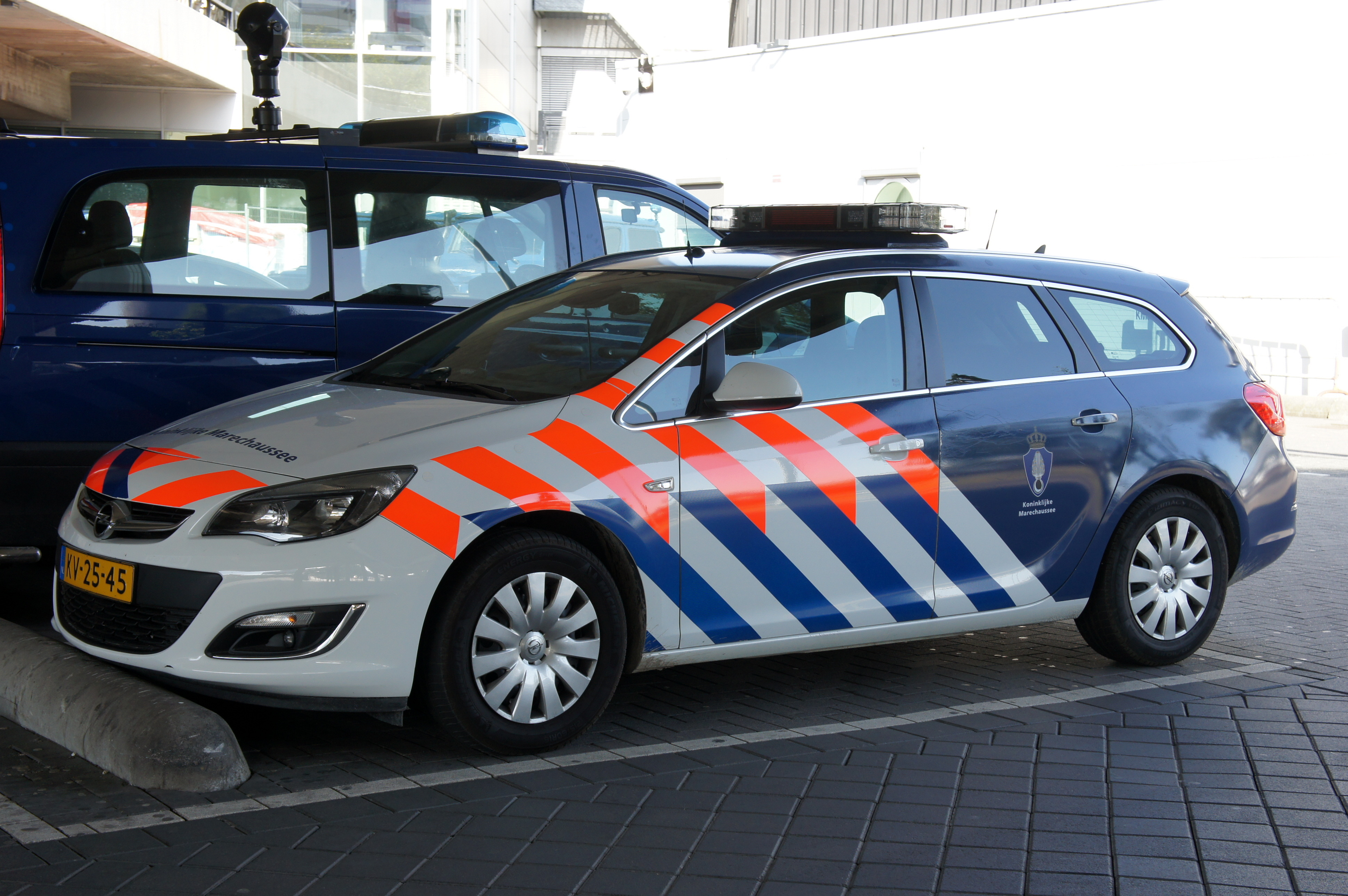 Opel Koninklijke Marechaussee, Schiphol.